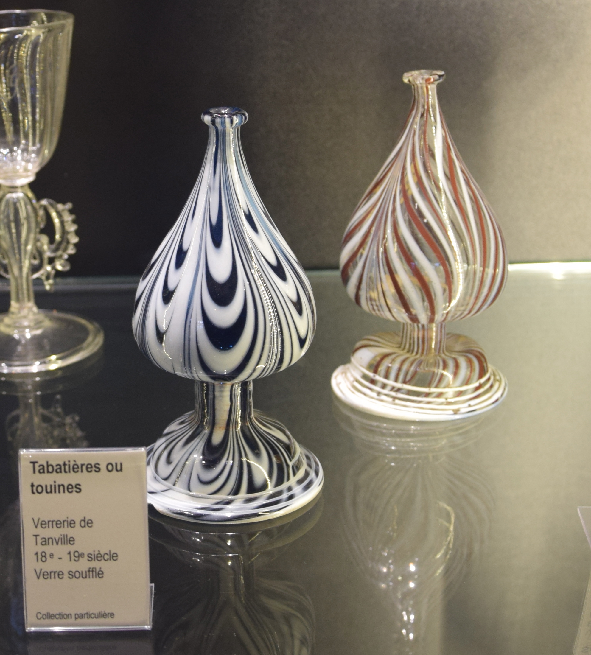 Château de Martainville - Touines